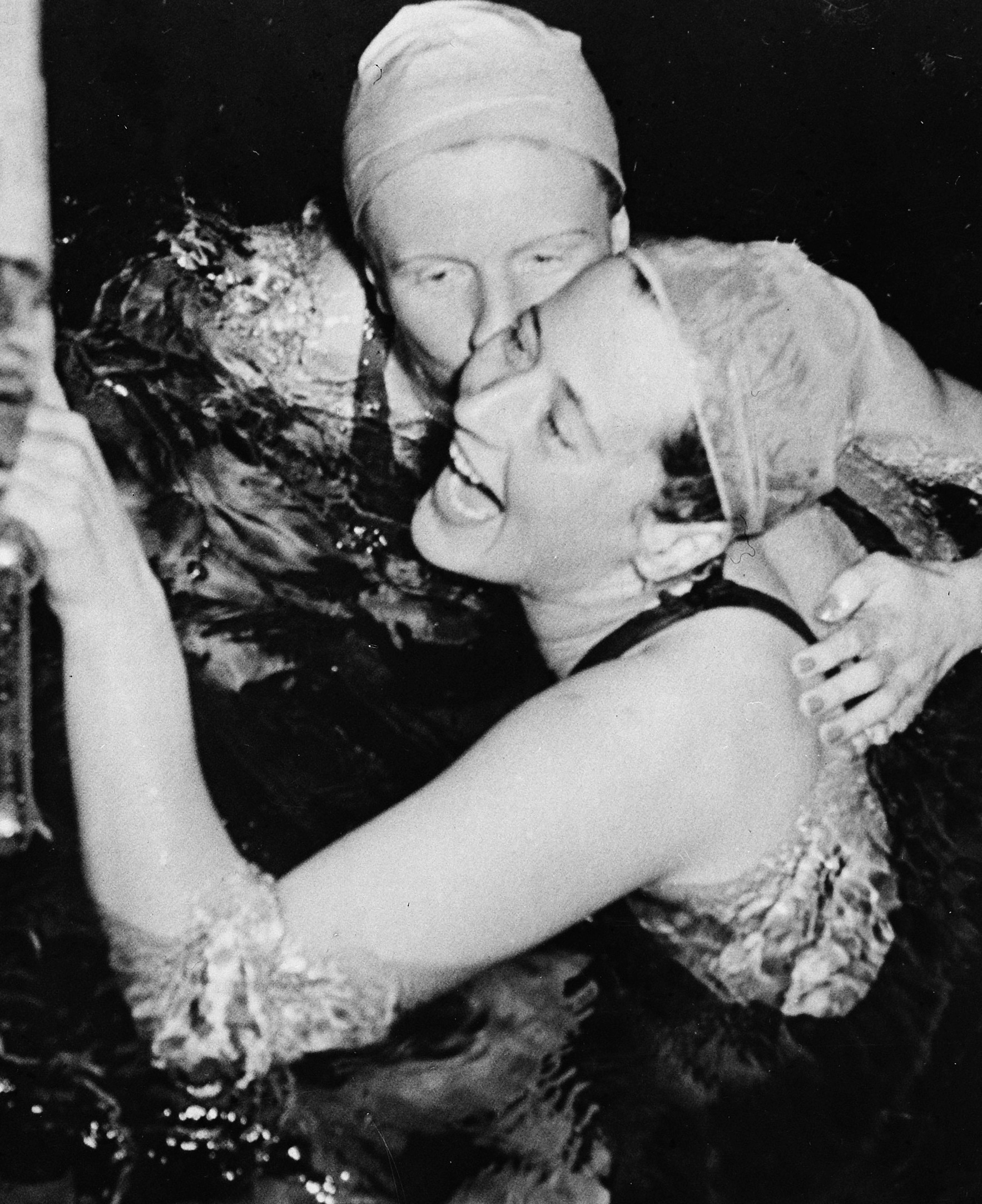 Zwemsters in Kopenhagen G. Andersen en Schuhmacher